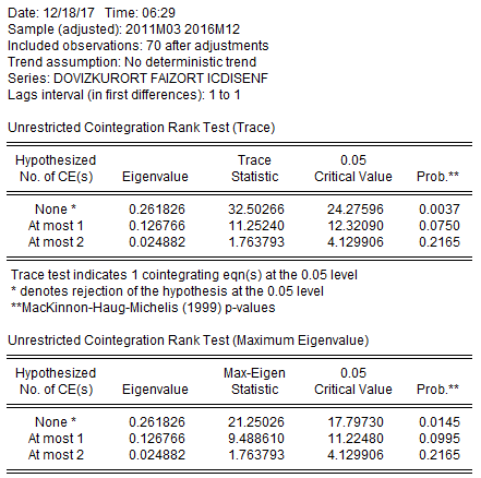 JohansenEşbütünleşme